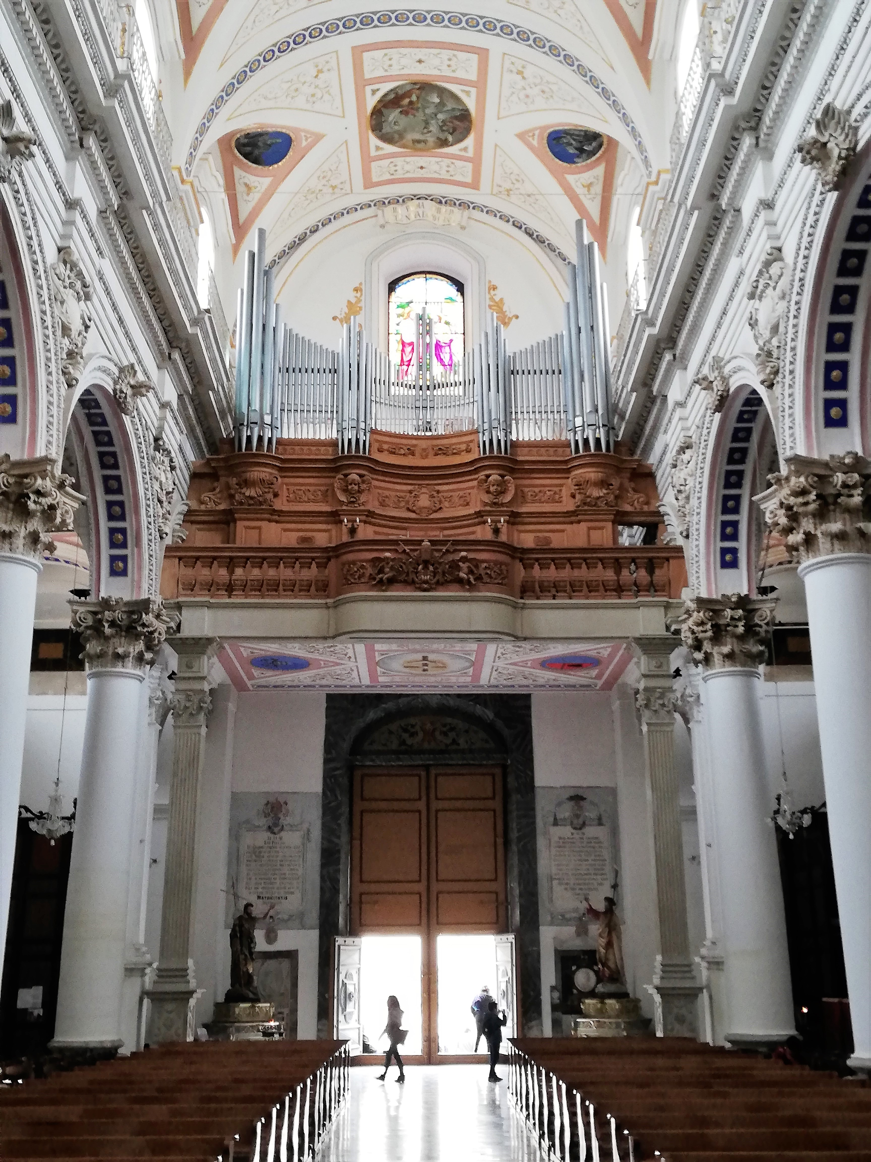 Controfacciata.